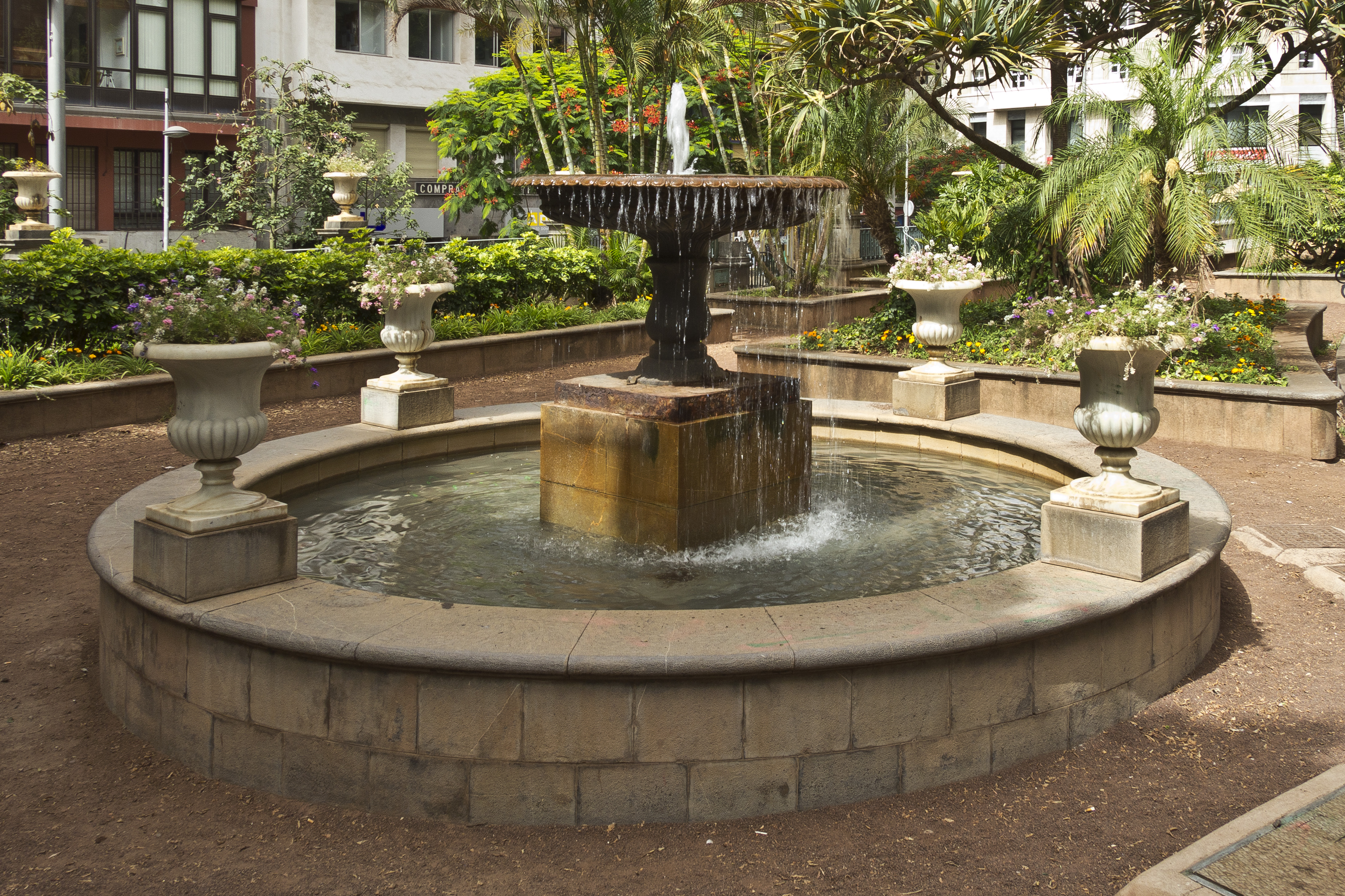 Der Springbrunnen auf der Plaza del Príncipe de Asturias in Santa Cruz de Tenerife ist das übergebliebene Oberteil eines Brunnens, der früher in der Mitte des Platzes stand.